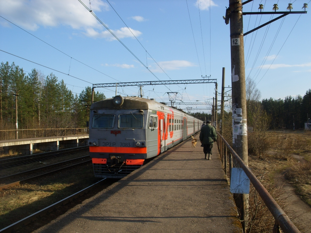 Электропоезд ЭР2Р-7083 на станции Посёлок, п. Вырица, Ленинградская обл.